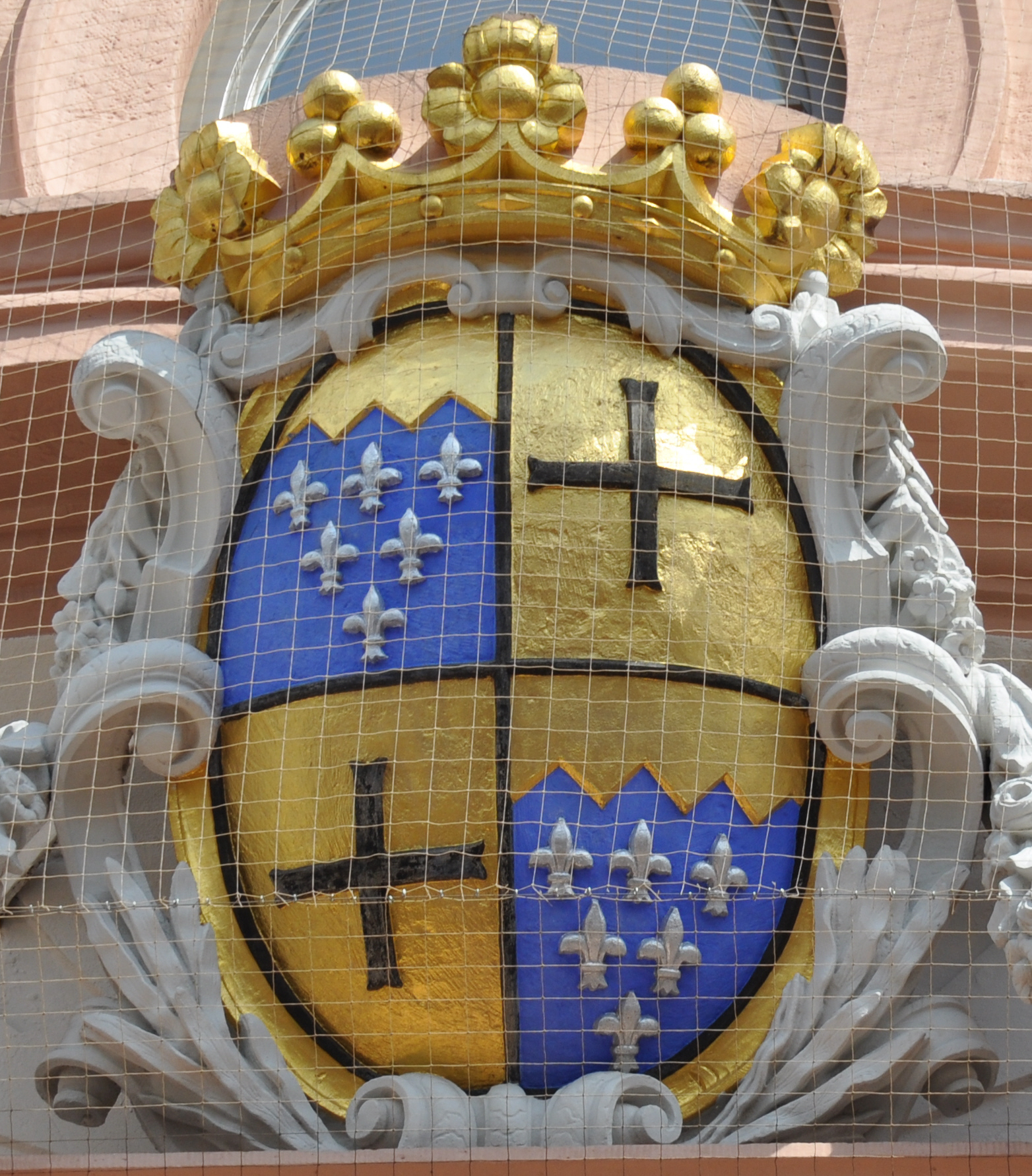 Mainz, Jüngerer Dalberger Hof